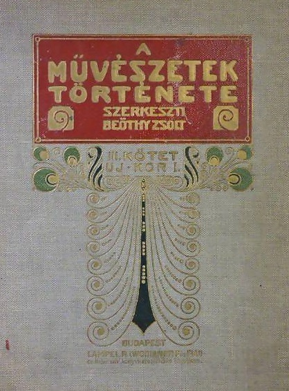 (szerk.) Beöthy Zsolt (1848-1922): A művészetek története (1906-1912)